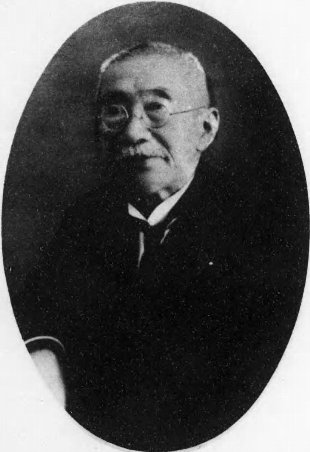 高平小五郎